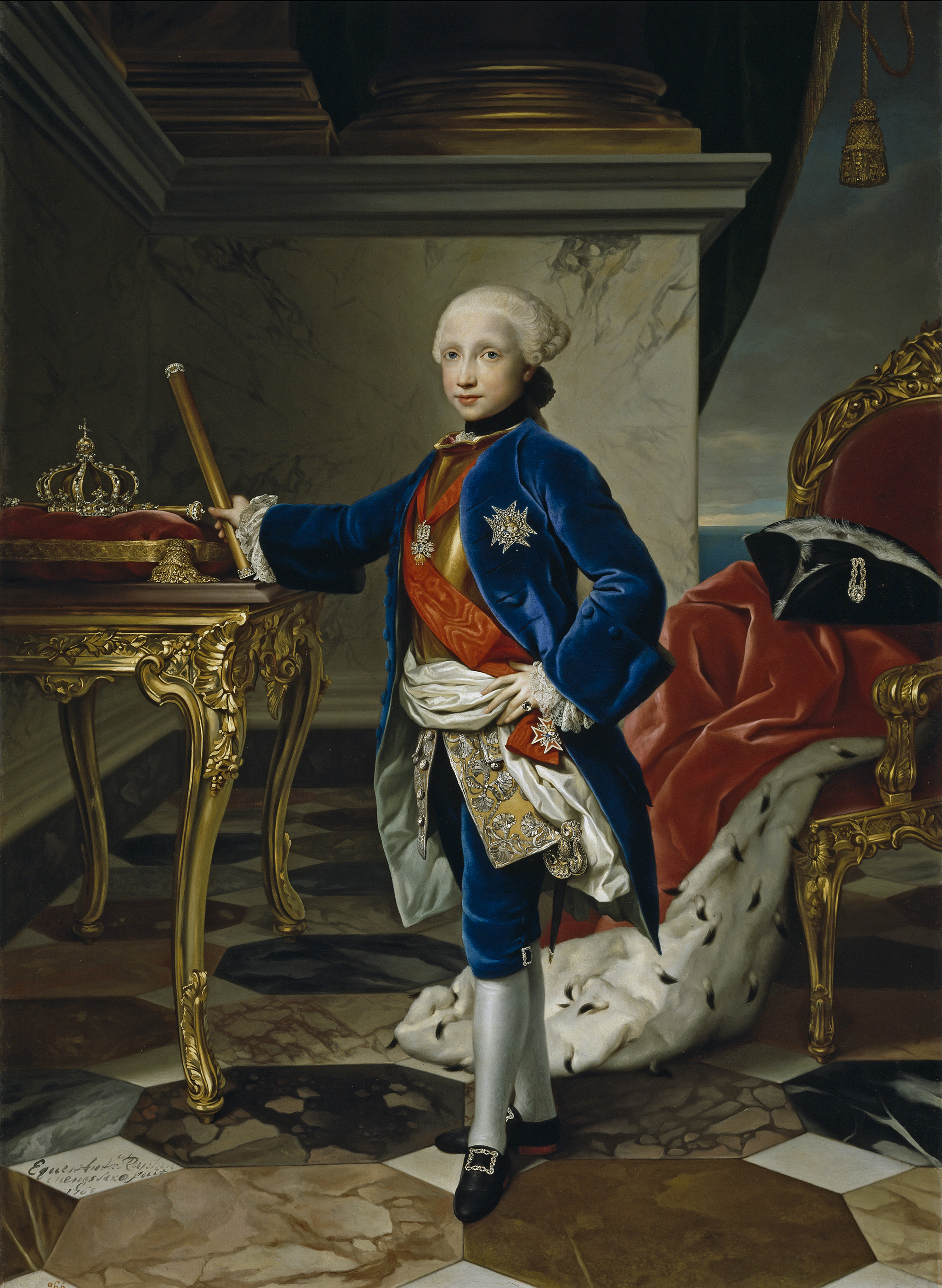 Retrato del rey Fernando IV de Nápoles (1751-1825), que fue el tercer hijo del rey Carlos III de España y de la reina María Amalia de Sajonia. El joven monarca aparece luciendo las insignias de la Orden del Toisón de Oro y de la Orden de San Jenaro.